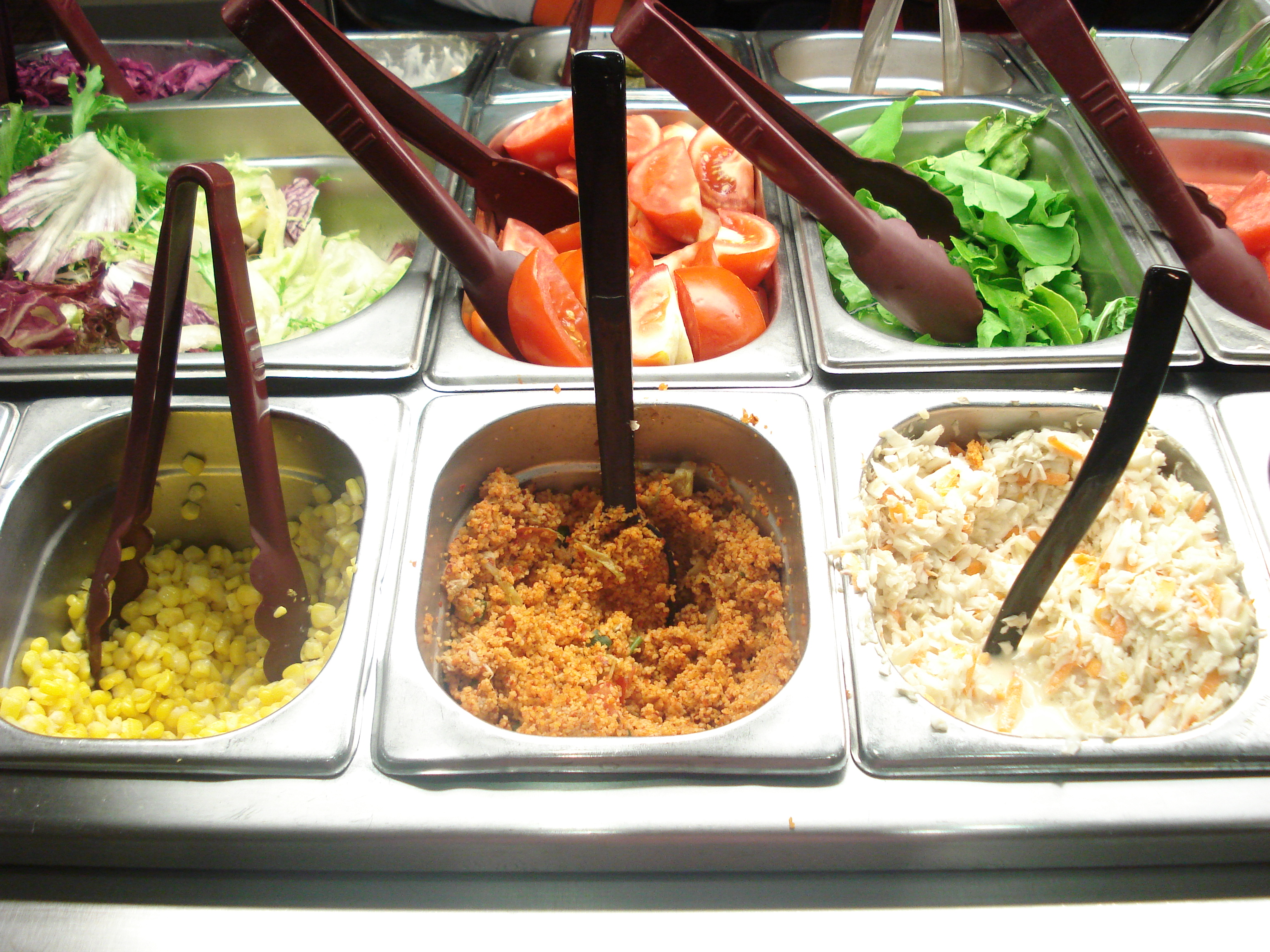 Salad bar from a Pizza Hut restaurant in İstanbul